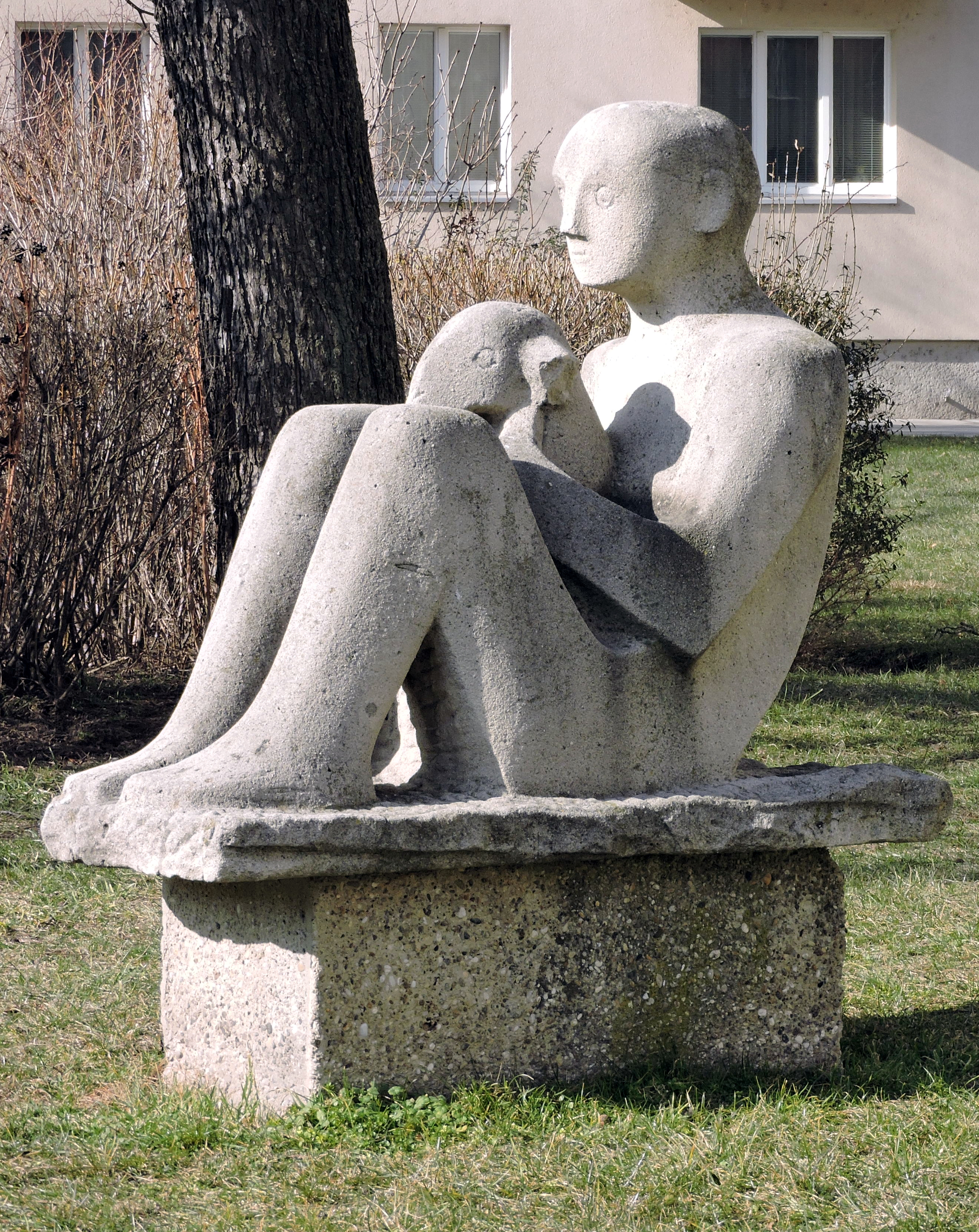 Sitzender Knabe mit Tier